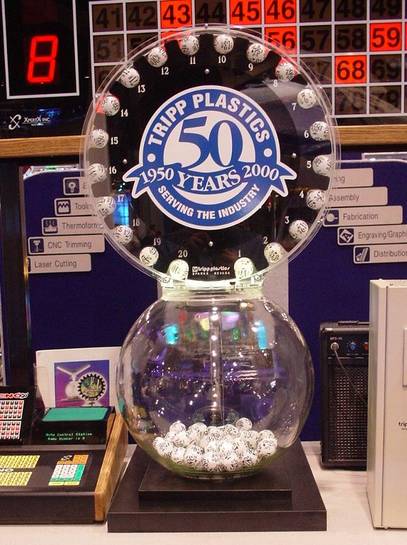 modern keno goose